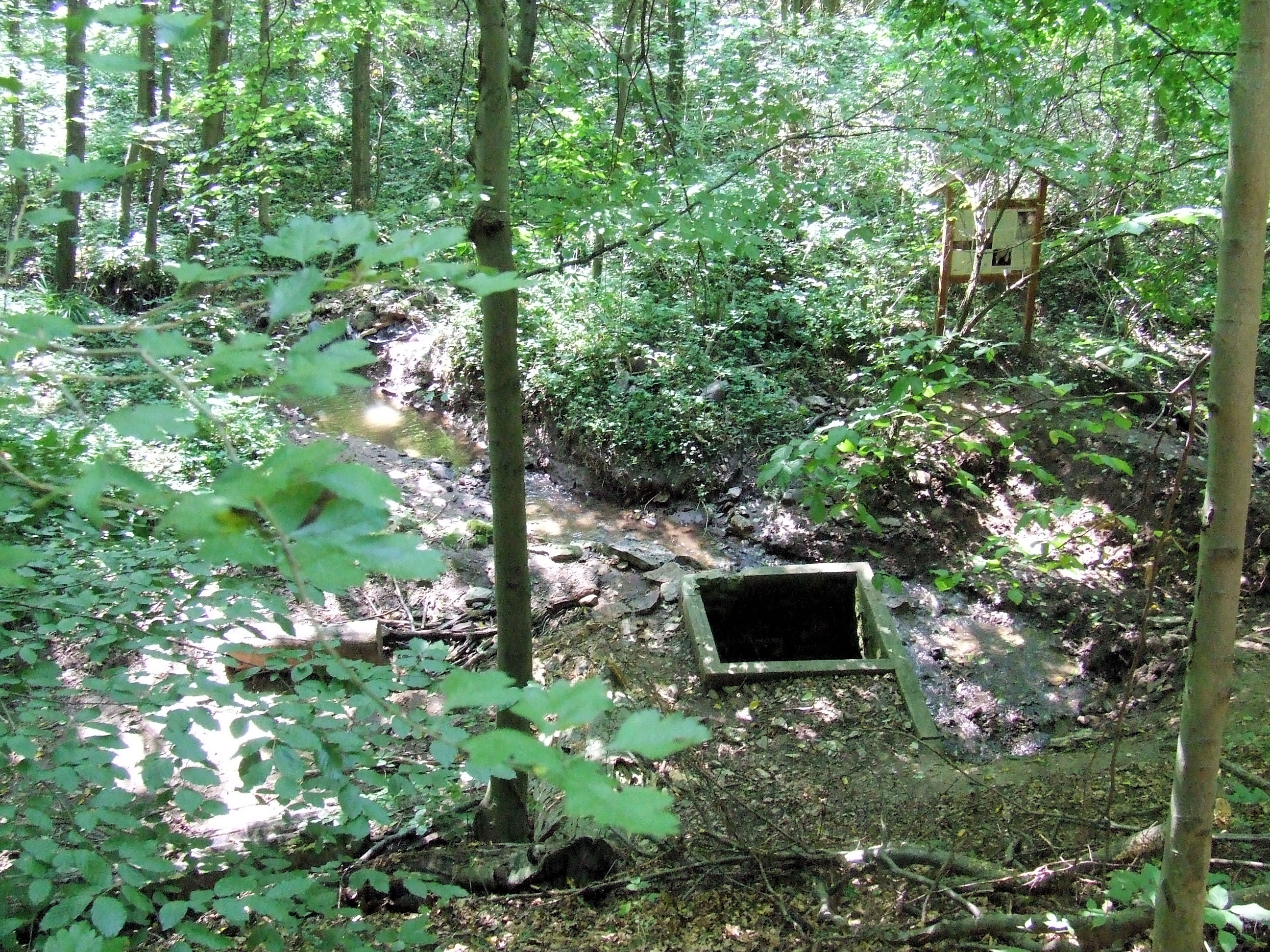 A Szuadó-völgyi-víznyelőbarlang lejárata a Szuadó-völgyben (Mecsek)